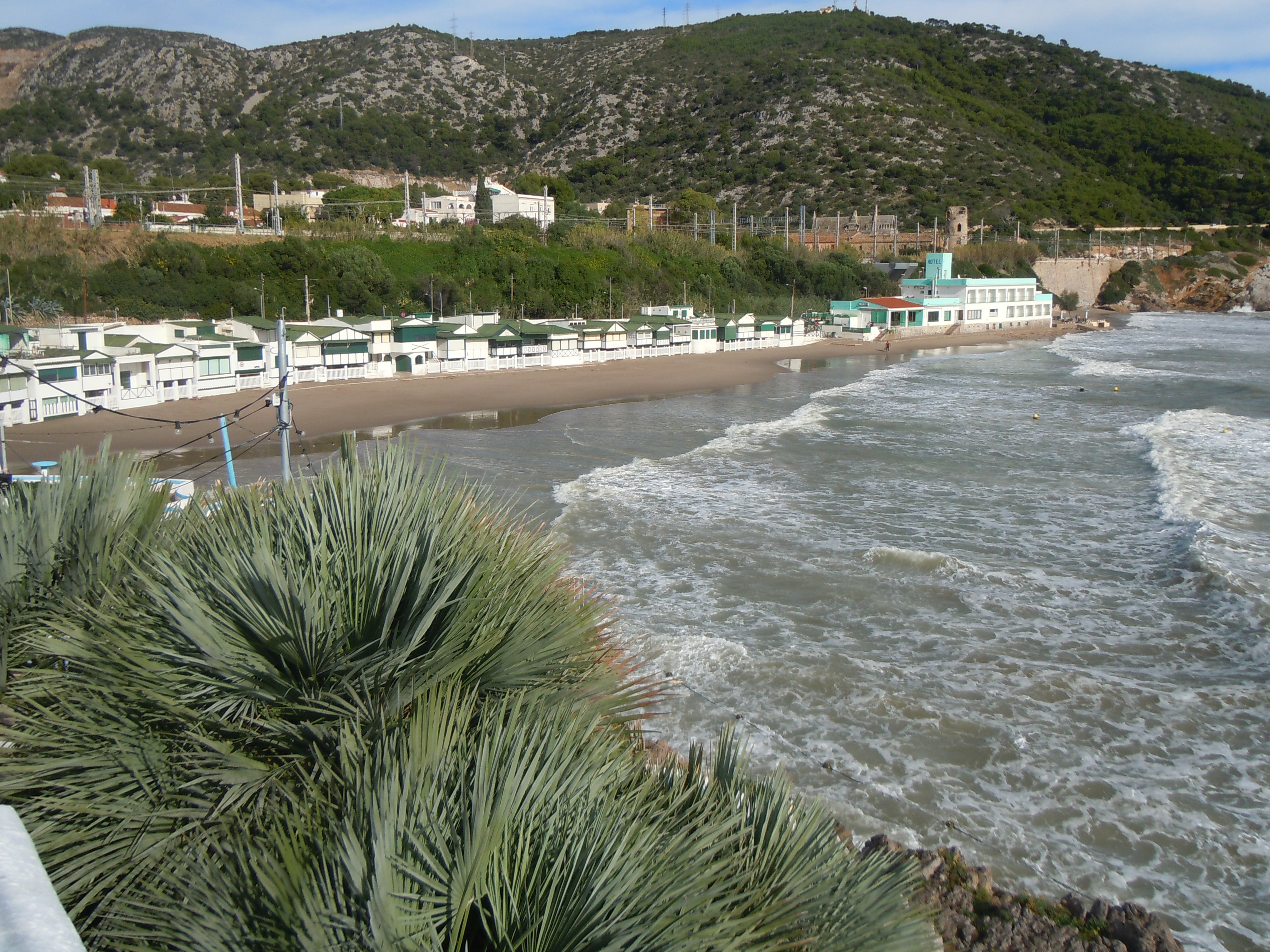 Platja de Garraf (Sitges) This is a a photo of a beach in Catalonia, Spain, with id: PL-CT-17003-292